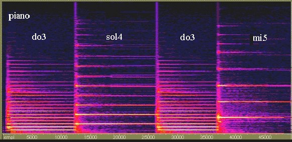 Sonagramme de notes jouées au piano réalisé par logiciel (copie d'écran) Auteur : (Dbfls 11 février 2006 à 15:03 (CET)) Actuellement sur le site "Physique-musique" archivé sur Edutice